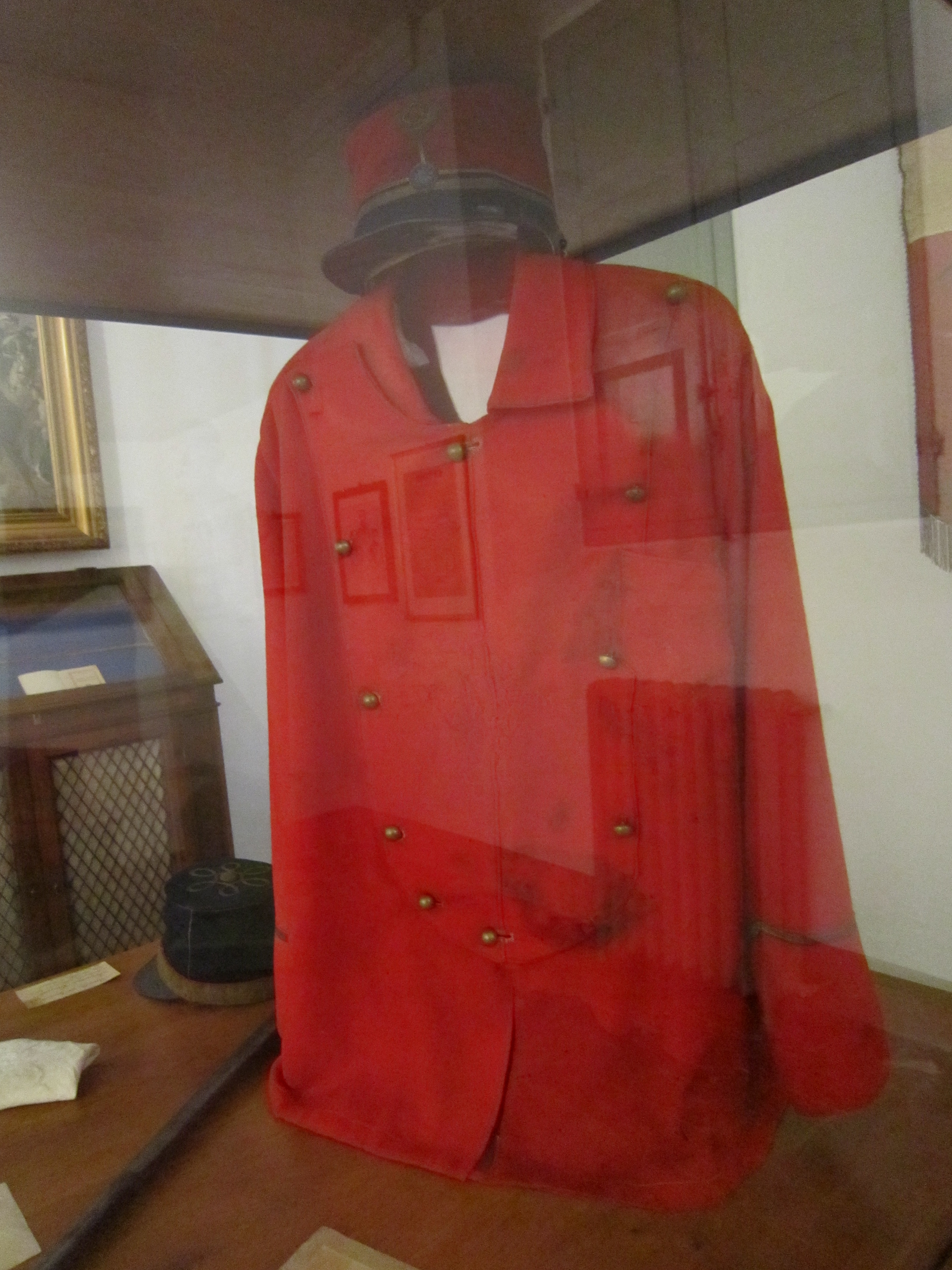 Divisa di Antonio Fratti macchiata del suo sangue, foto propria